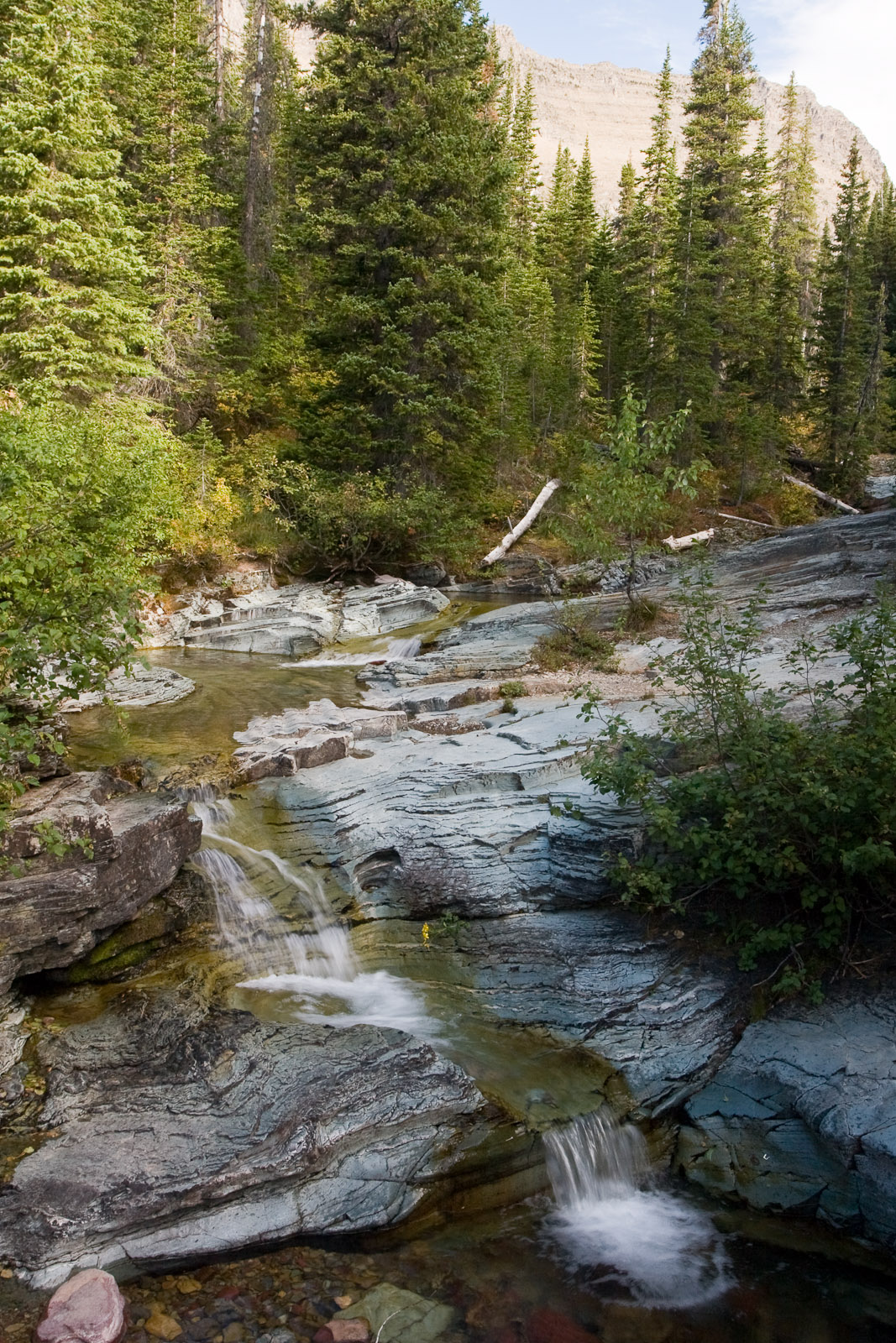 Ptarmigan Falls